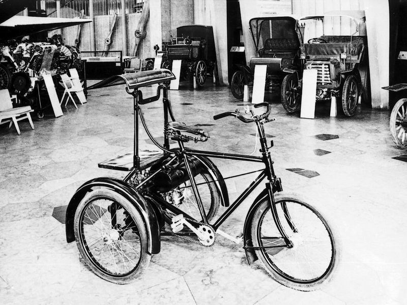 Csonka János-féle levélgyűjtő tricikli